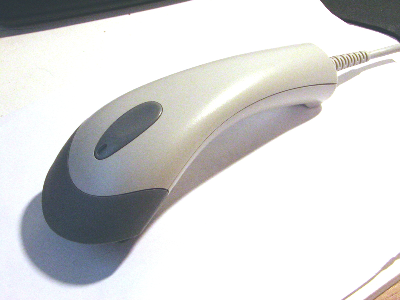 CCD Barcode Scanner Argox AS-8000.